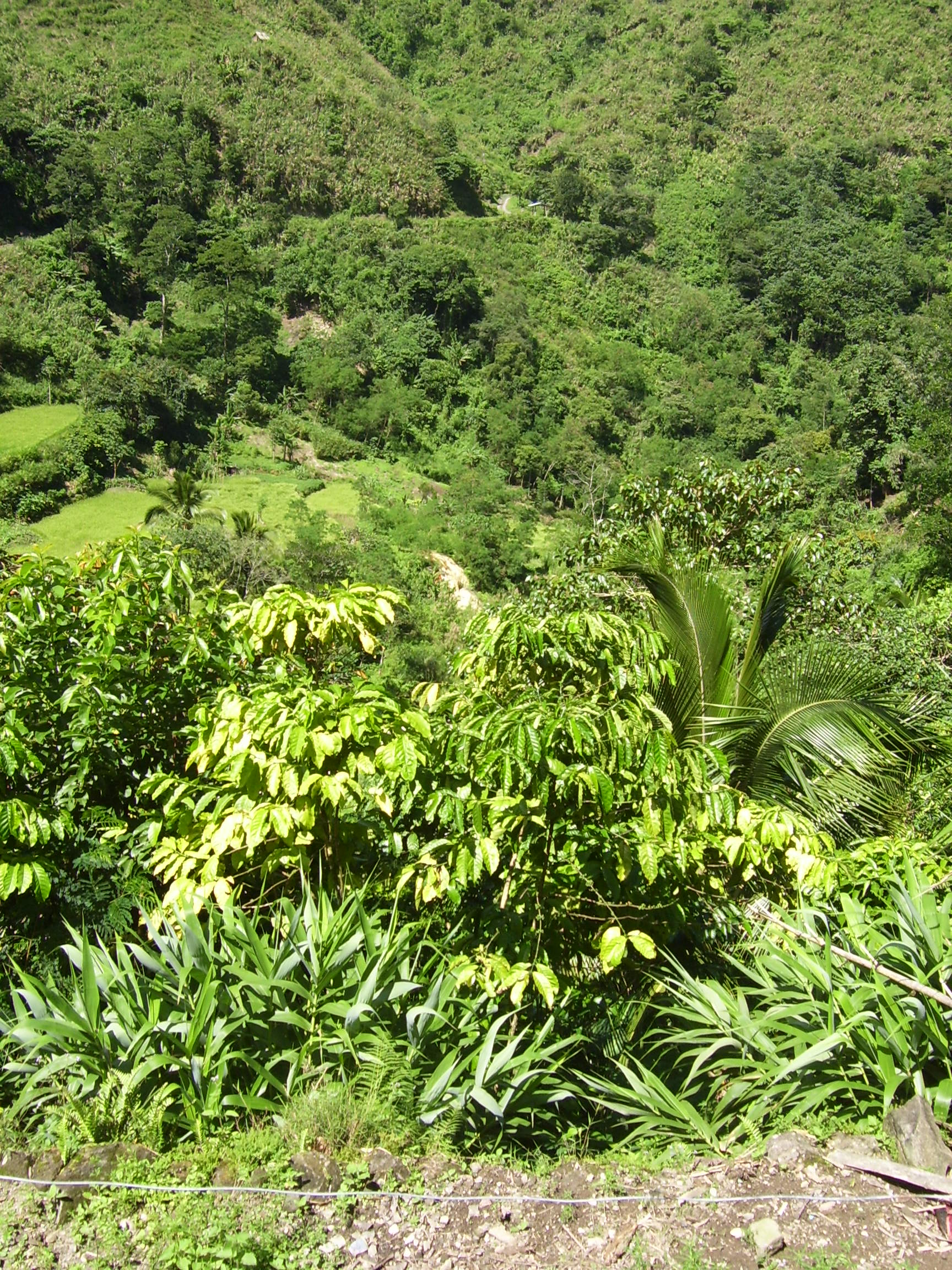 Sun-ut Hot Sulfur Spring